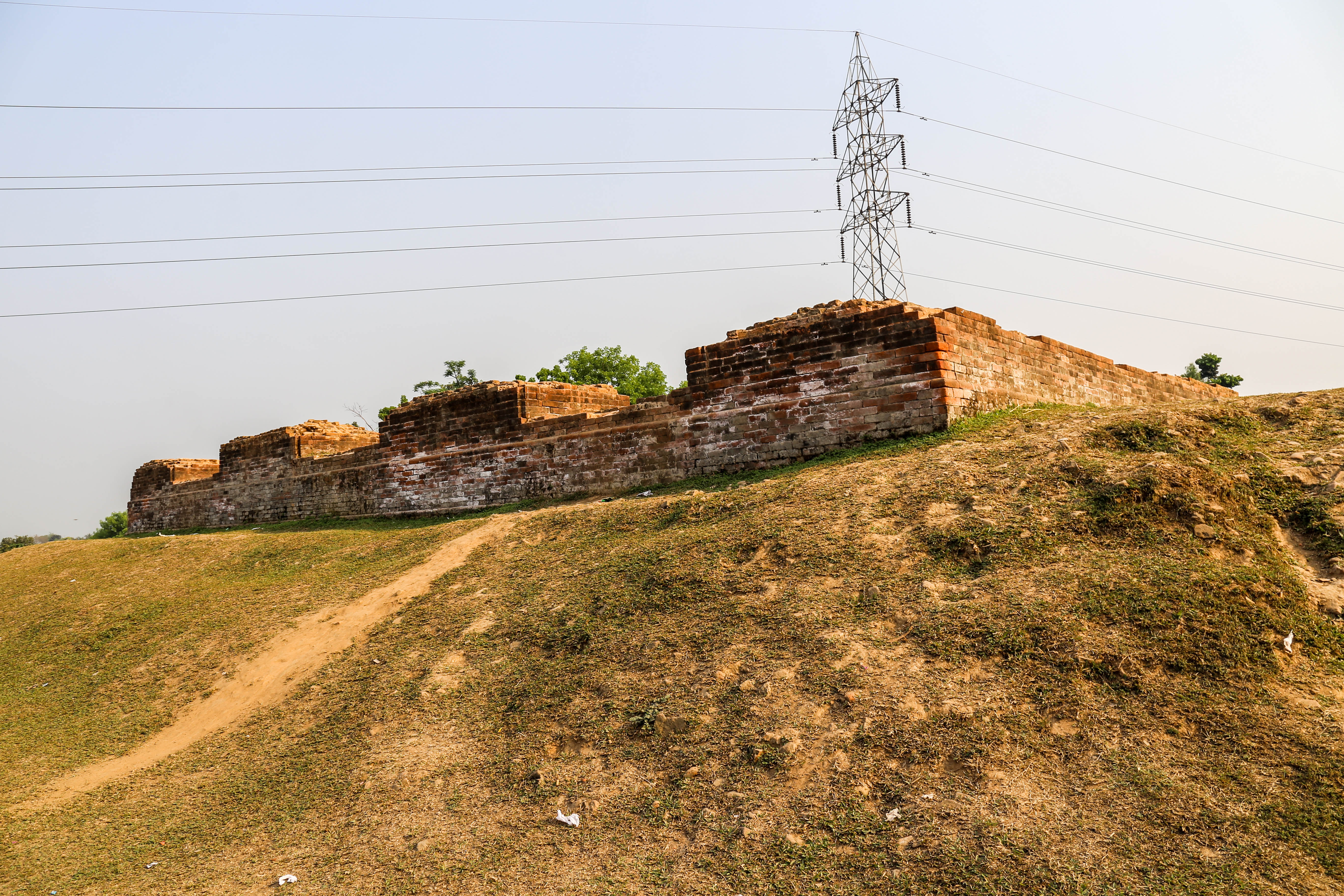 মানকালীর ঢিবি